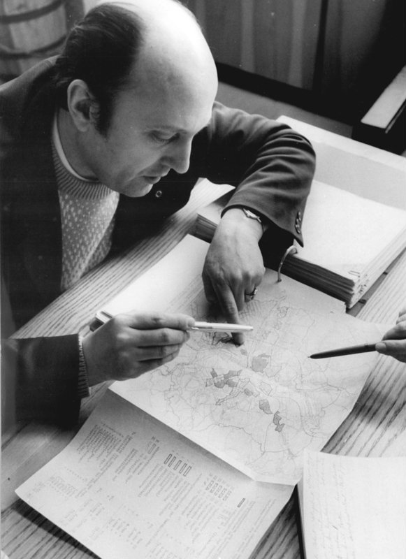 ADN-ZB / Sturm / Na- / 30.4.1974 / Zur Reportage "Freuden und Sorgen der Städteplaner" Karl-Marx-Stadt, viertgrößte Stadt der Republik, ist auf dem besten Weg, Anziehungspunkt für Touristen zu werden. Die einst häßliche Stadt, die alte Arbeiter verbittert "Ruß-Chemnitz" nannten, hat viel neues und schönes vorzuweisen. Fast jede dritte Familie zog bereits in eine Neubauwohnung. Die reichen Traditionen der Arbeiterbewegung findet man auf Straßen, Plätzen und in Gebäuden der Stadt in zahlreichen bildkünstlerischen Arbeiten dargestellt. Karl-Marx-Stadt ist interessant geworden. UBz: Stadtarchitekt Joachim Beuchel hat sich mit seinem Kollektiv viel den Kopf über seine Geburtsstadt Karl-Marx-Stadt zerbrechen müssen. Dabei suchten die Städteplaner den Rat der ganzen Stadt und erhielten tausende Vorschläge und Hinweise.